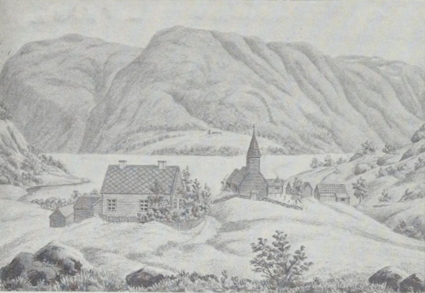 Solvorn gamle kirke etter en tegning av Martin Luther Storm. Kirken ble revet i 1883. Fra Jon Laberg: «Hafslo: Bygd og ætter» (Bergen, 1926).